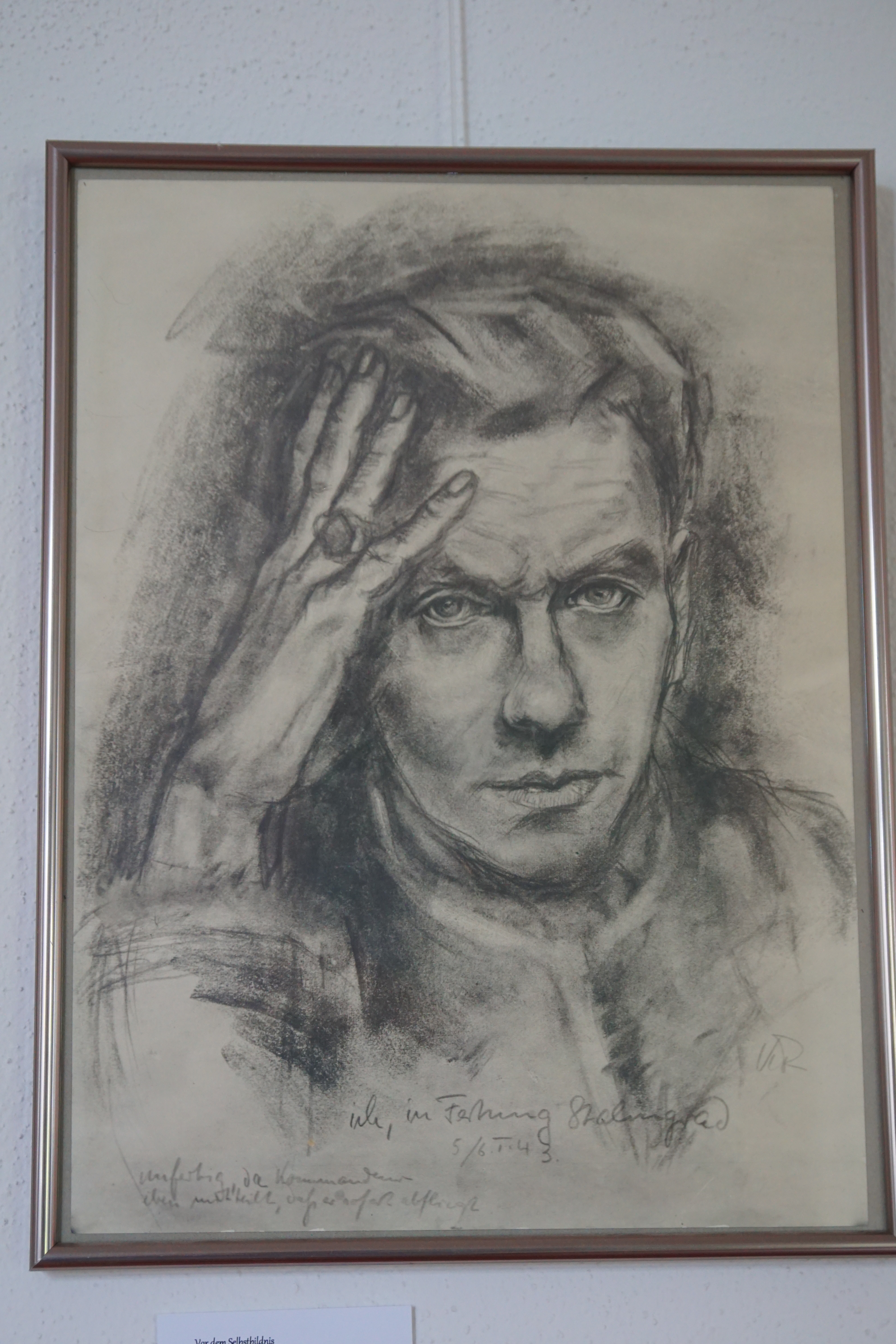 Kurt Reuber, Selbstbildnis. Dieses Exemplar hängt im Kloster Kirchberg, es ist nicht ersichtlich, ob es sich um das Original oder eine Kopie handelt. Das Bild hat den Titel: "ich, in Festung Stalingrad" und ist datiert auf den 5./6. Januar 1943. Unten eine Notiz: unfertig, da Kommandeur eben mitteilt, daß er sofort abfliegt. Der Zeichner ist über siebzig Jahre tot, jegliche Urheberrechte sind nach deutschem Recht inzwischen erloschen.